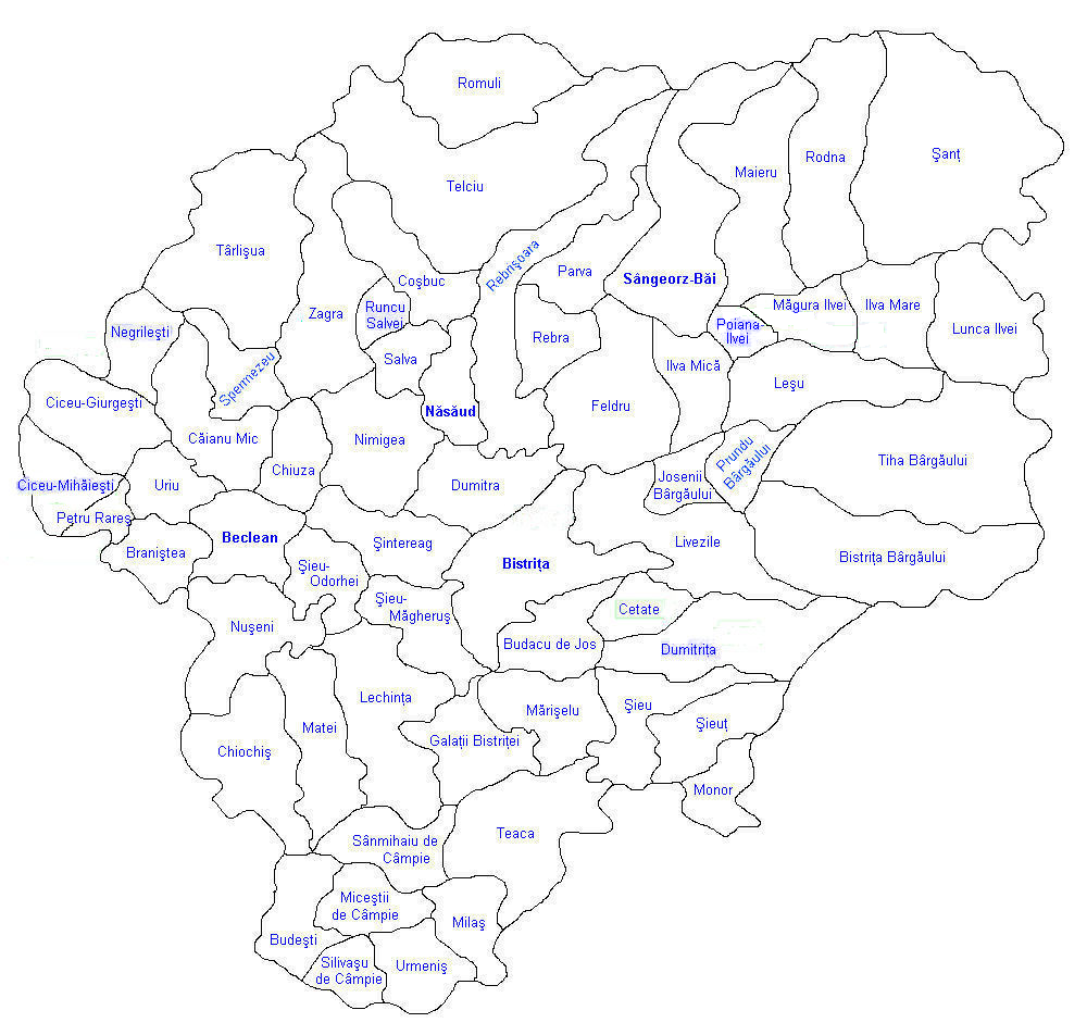 Categorie:Hărţi ale judeţului Bistriţa-Năsăud